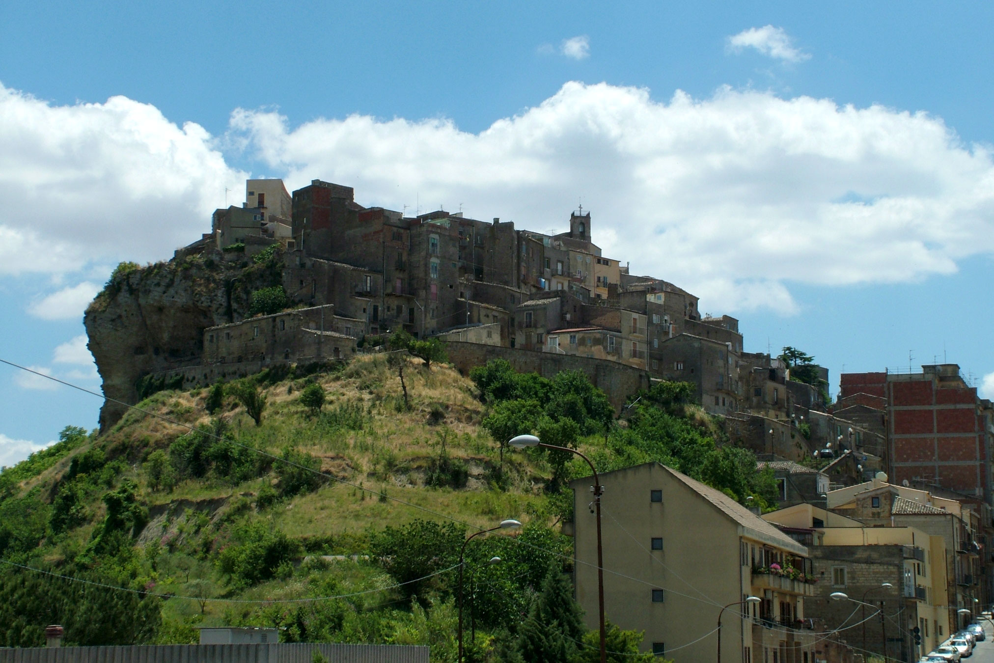 Calascibetta Blickvon der Chiasa Cappuccini